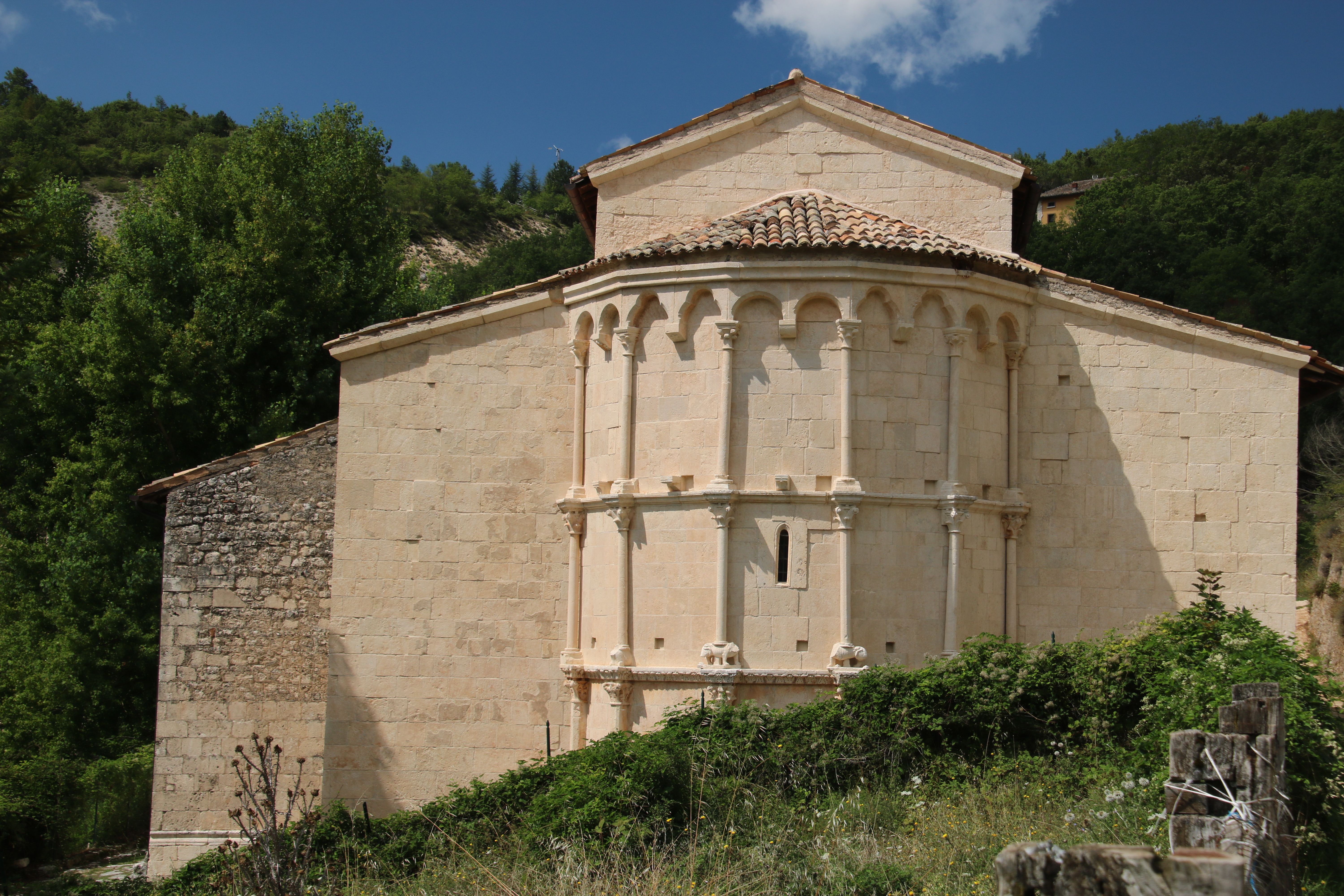 Chiesa di Santa Maria in Valle Porclaneta (Rosciolo dei Marsi)